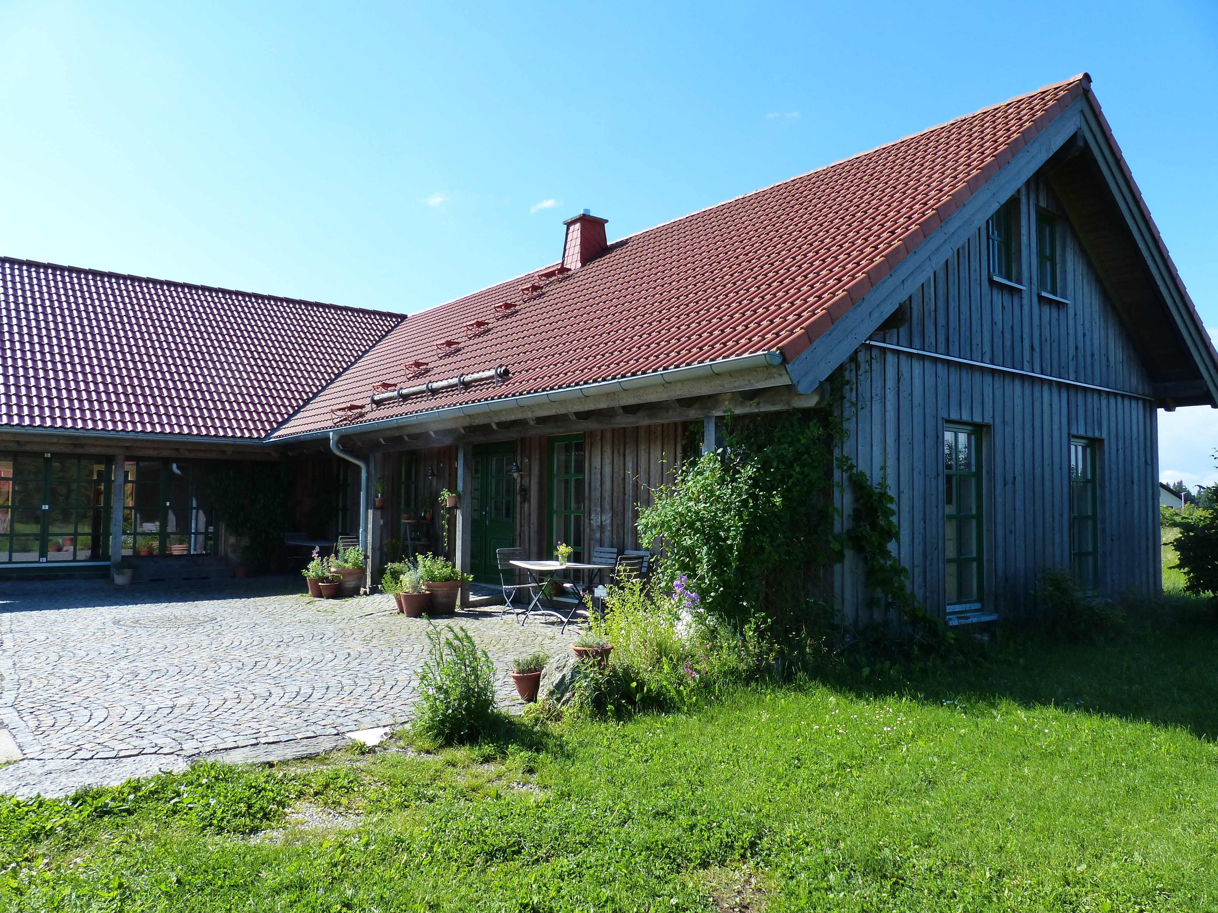 Naturhof